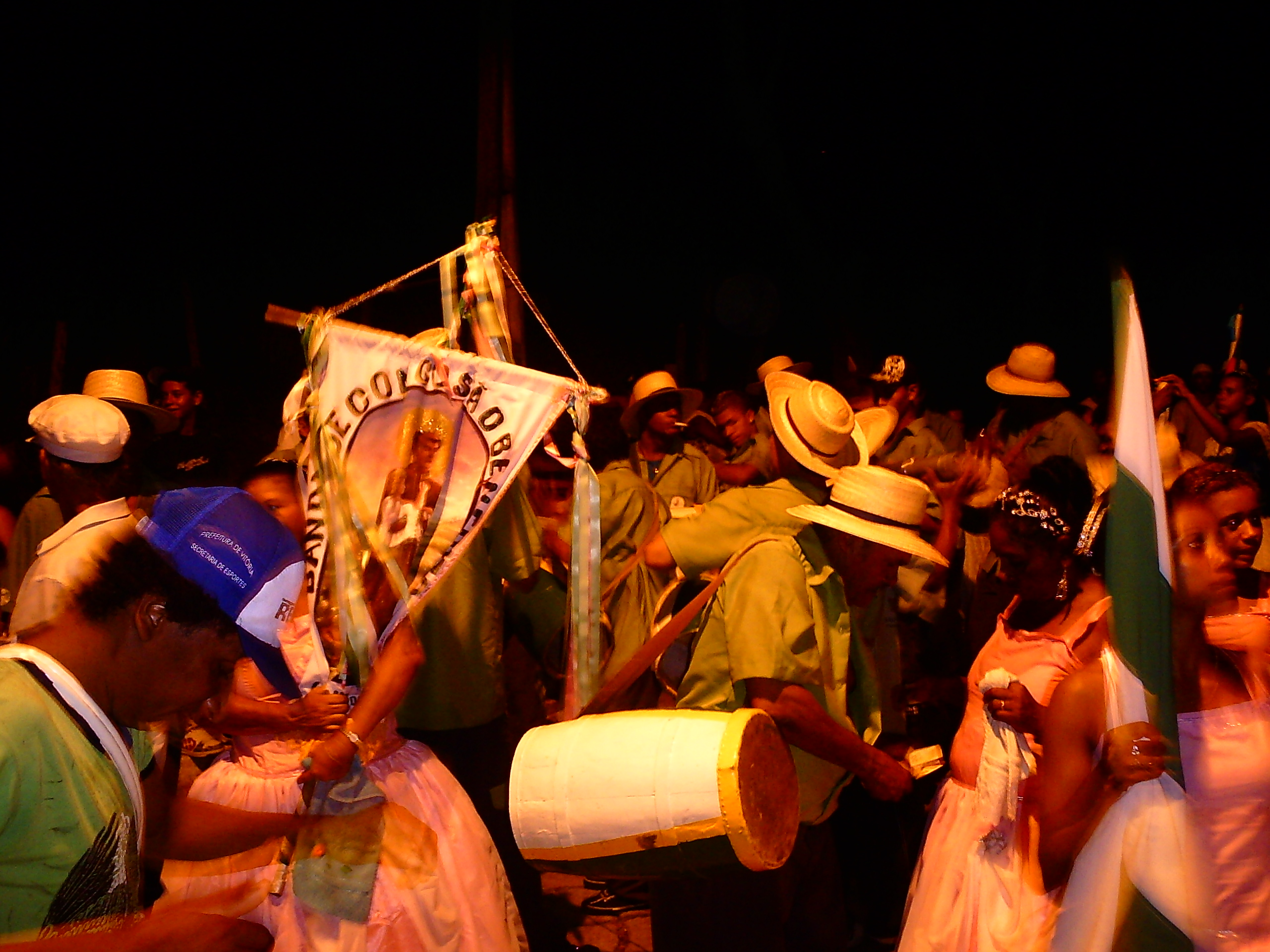 Banda de congo São Benedito, na Festa de São Benedito e São Sebastião em Fundão, Espírito Santo, Brasil.